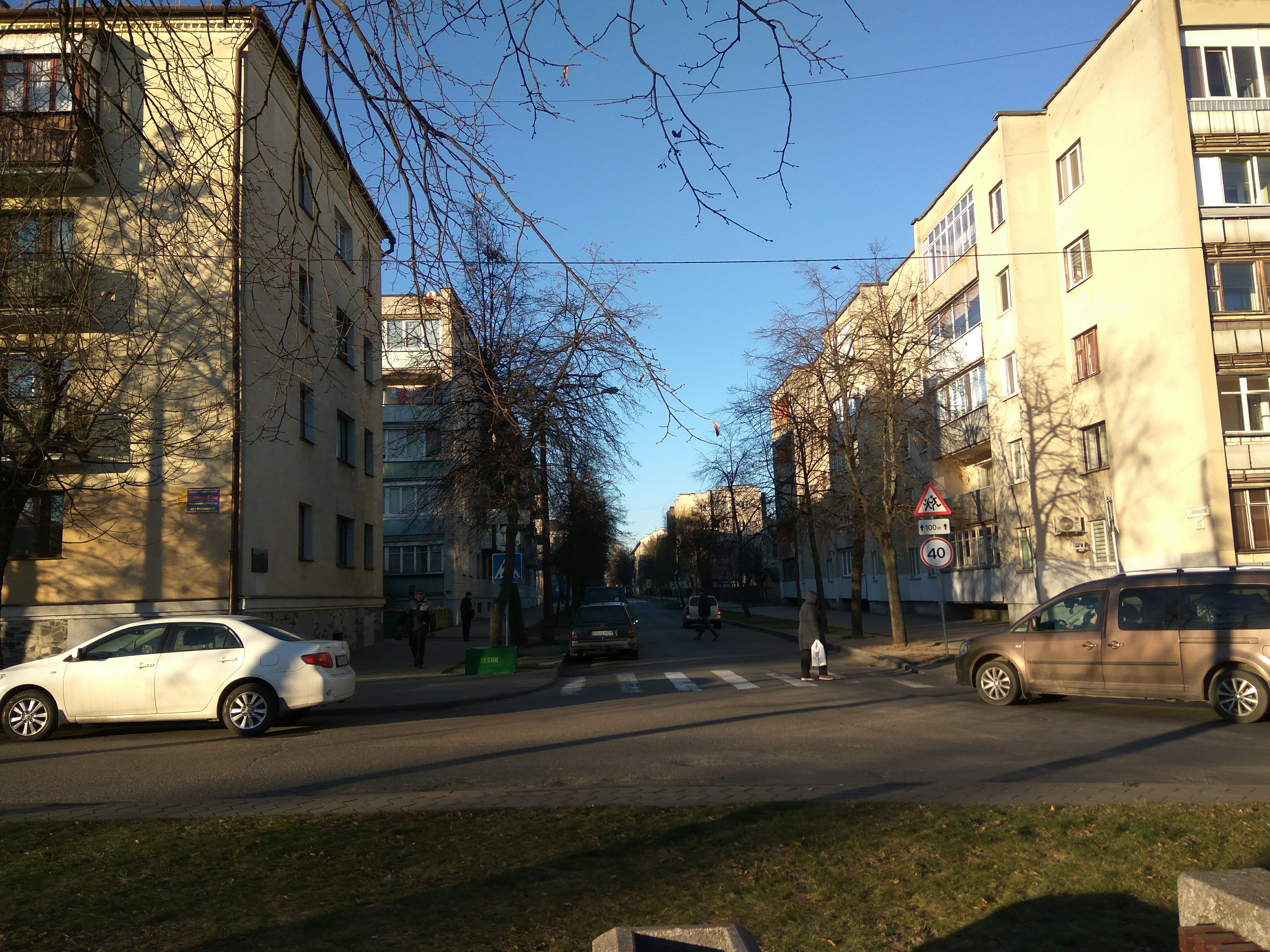 Брэст. Вуліца Карбышава